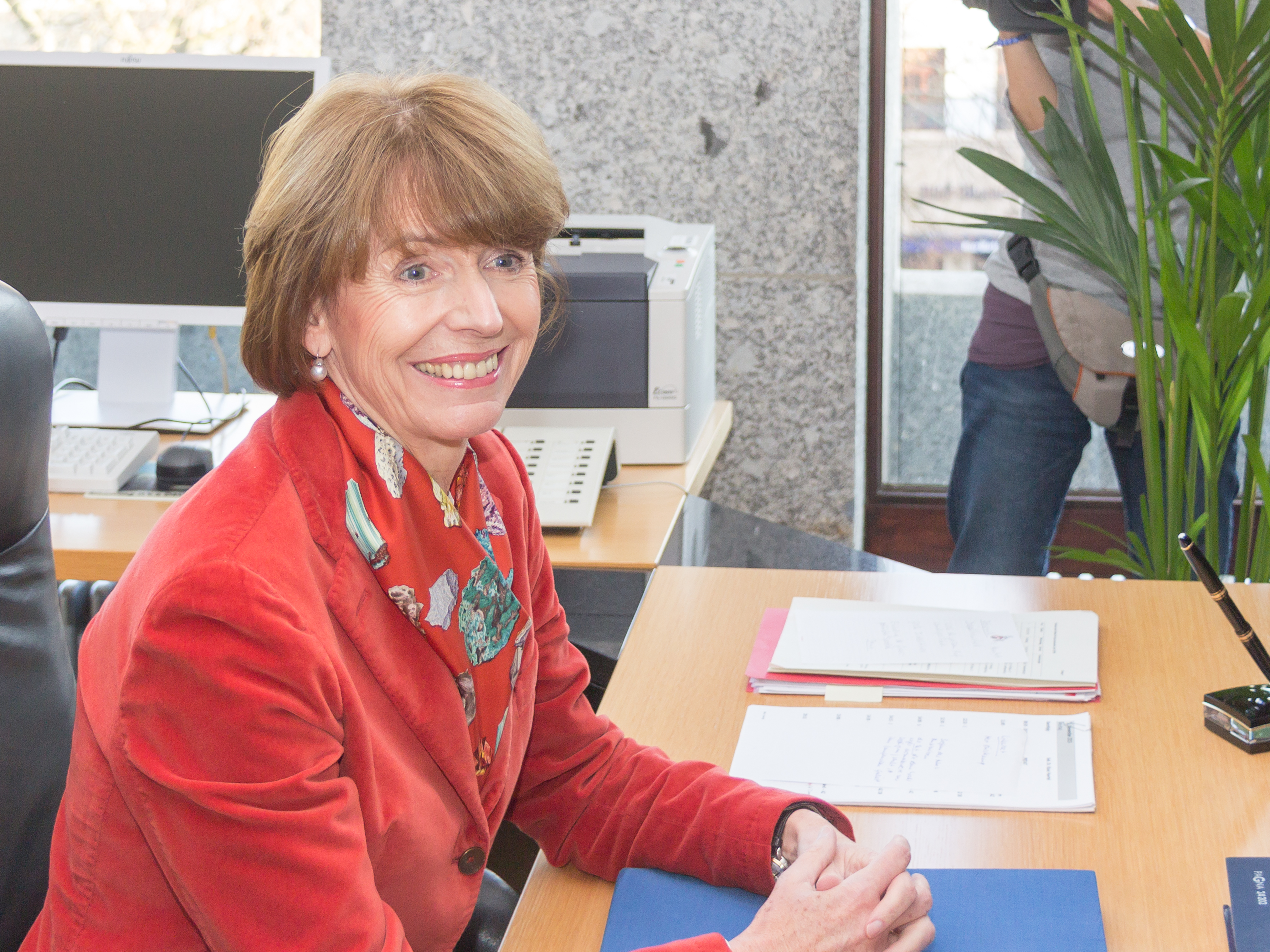 Pressetermin: Kölns neue Oberbürgermeisterin Henriette Reker bezieht ihr Amtszimmer